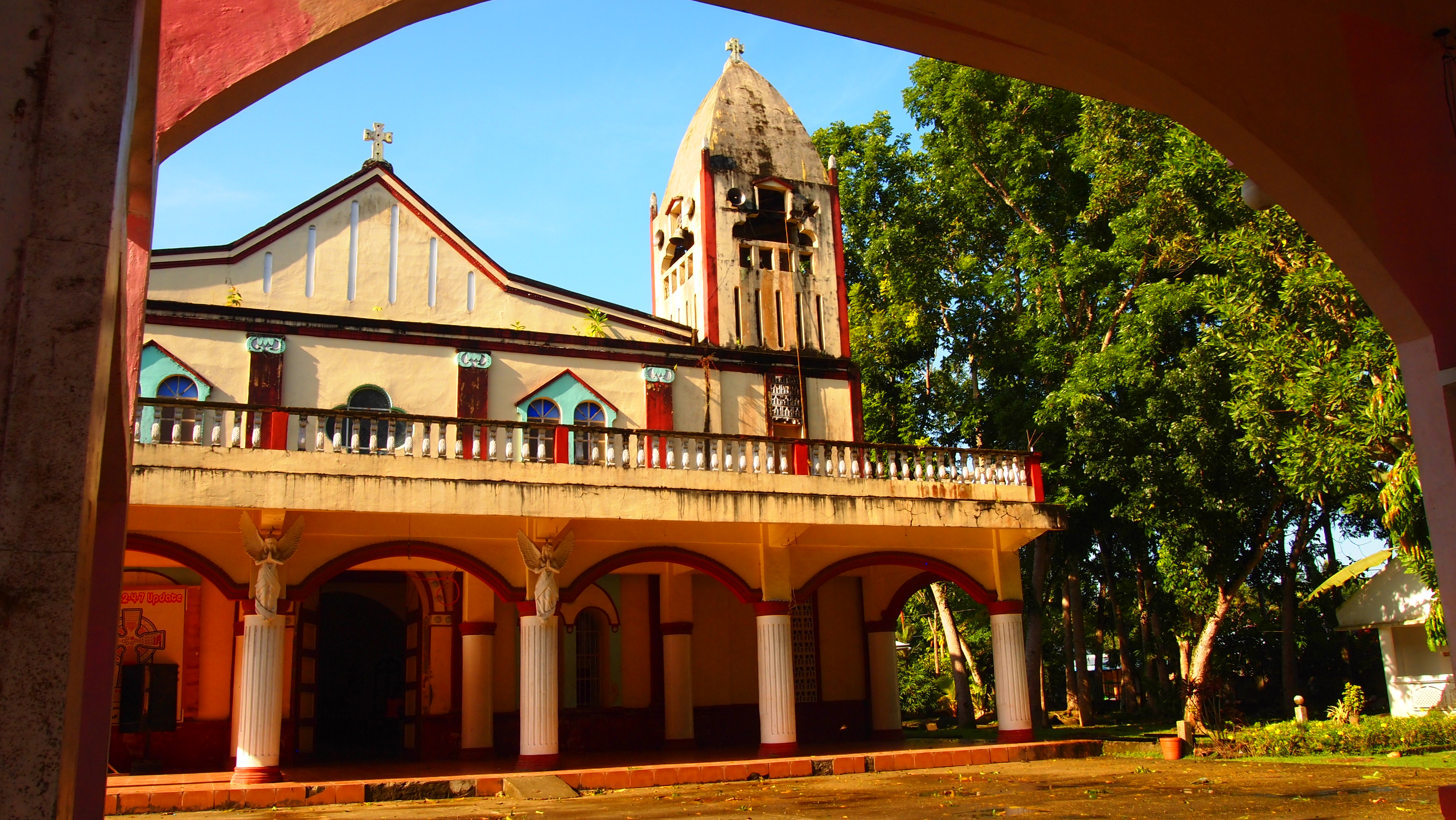 St. Francis Xavier Church, Katipunan, Zamboanga del Norte